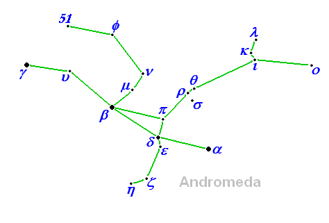 D´Stärebild Andromeda mat senge Stären.